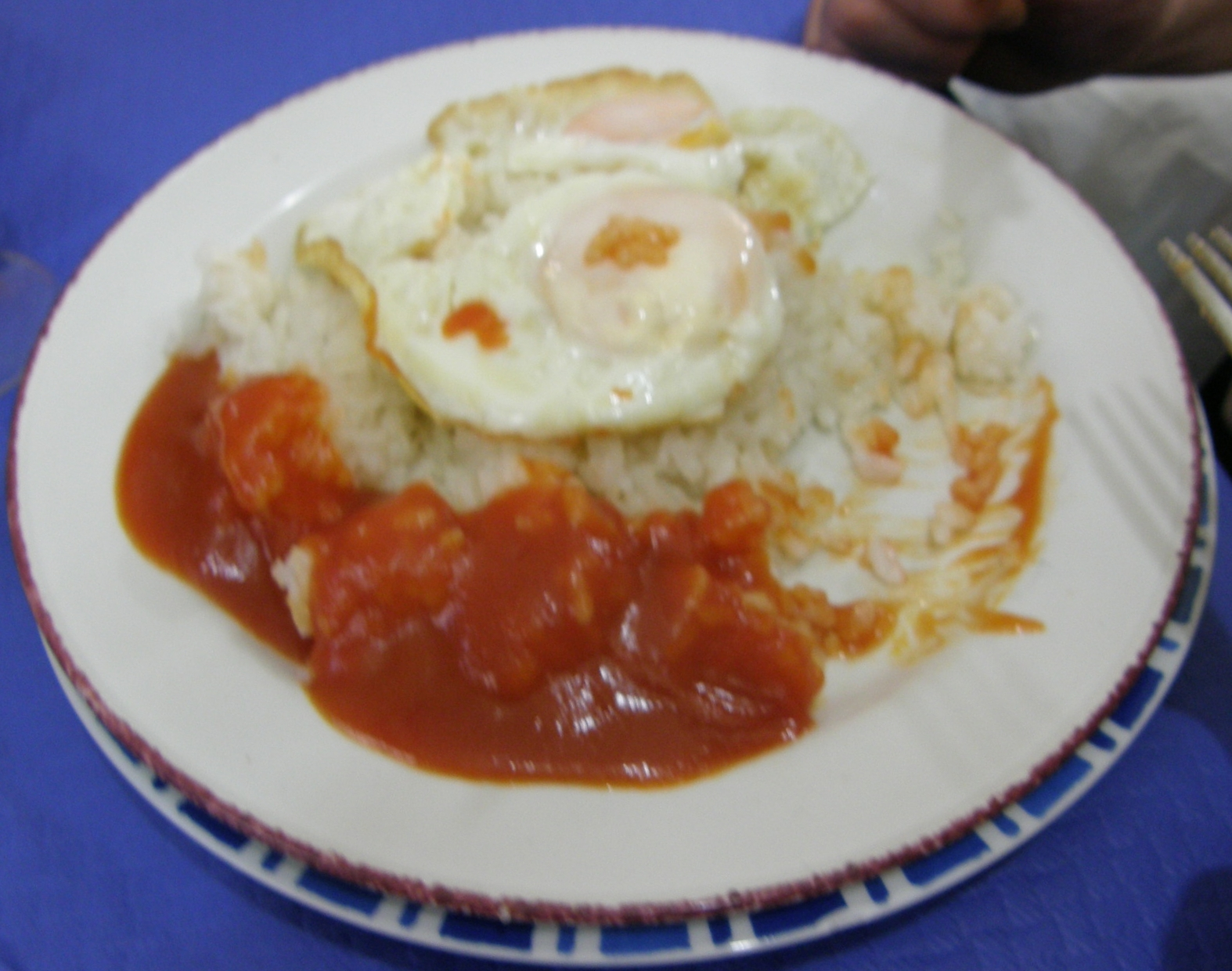 Un plato de arroz a la cubana.